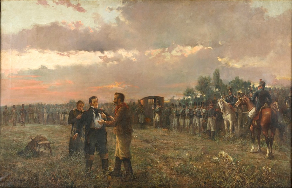 Gregorio Aráoz de La Madrid se despide de Manuel Dorrego, quien va a ser fusilado.